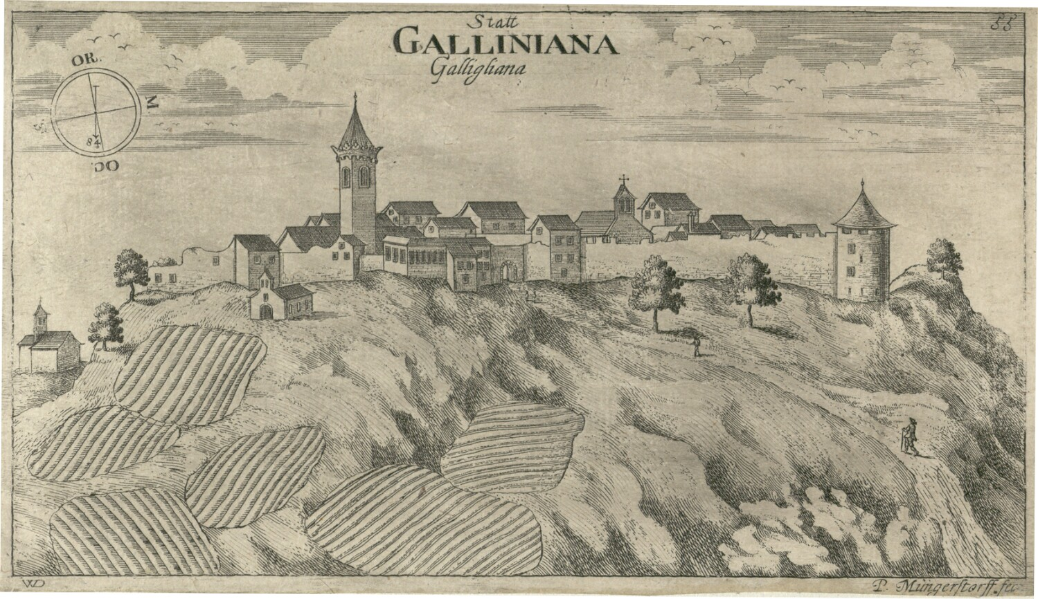 Gračišće